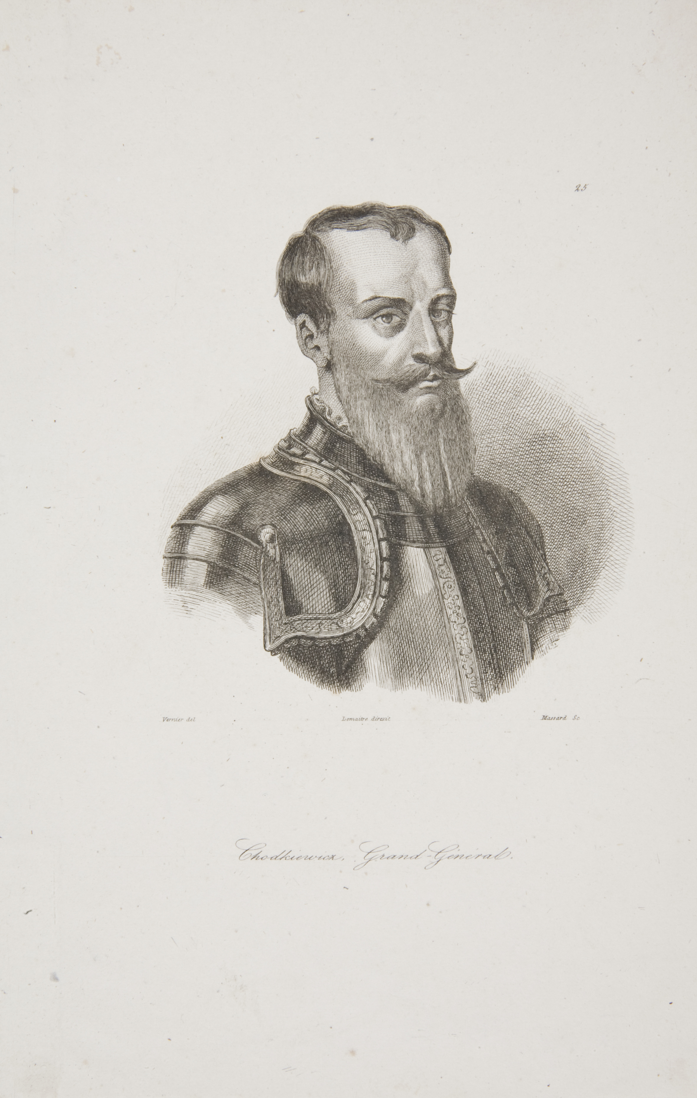 Беларуская (тарашкевіца): Партрэт Яна Караля Хадкевіча (Jan Karal Chadkievič)